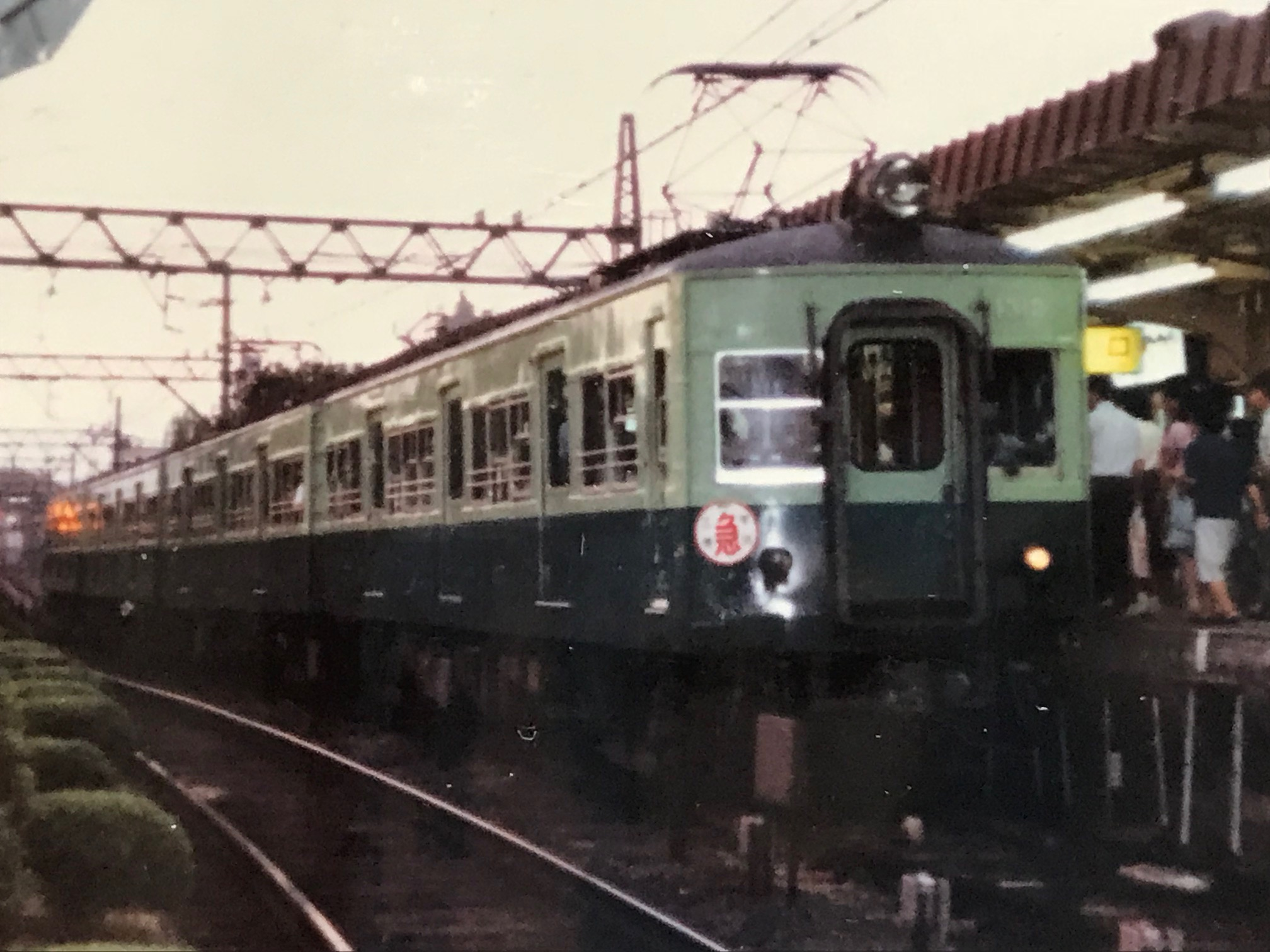 1300系宇治急